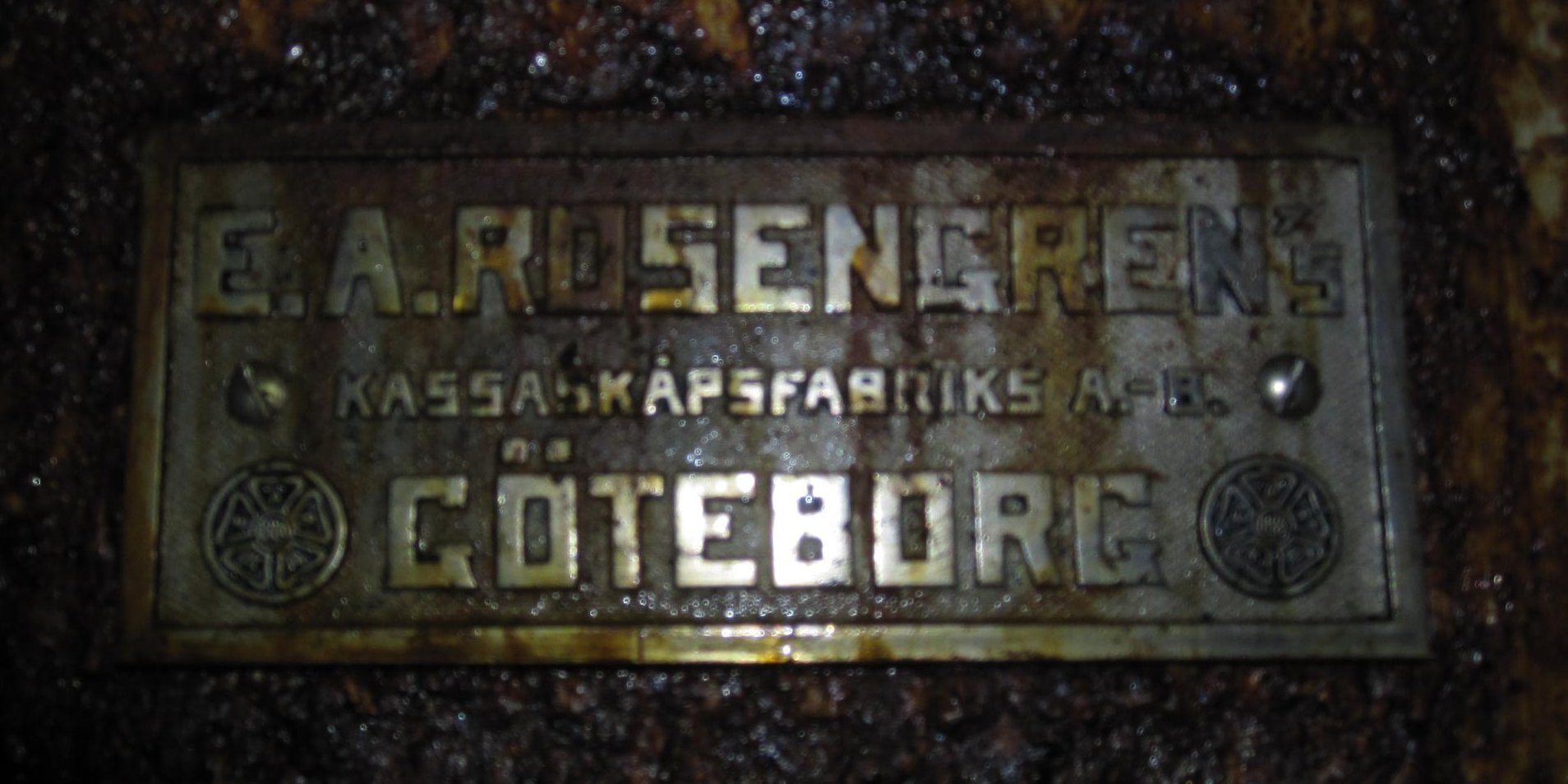 Skylt på ett gammalt trasigt kassaskåp i ett övergivet bergrum. Oklart vilken ålder kassaskåpet har, men handlingarna i det var ifrån 60-talet. Bilden är ett urklipp ur min bild som finns med på Flickr